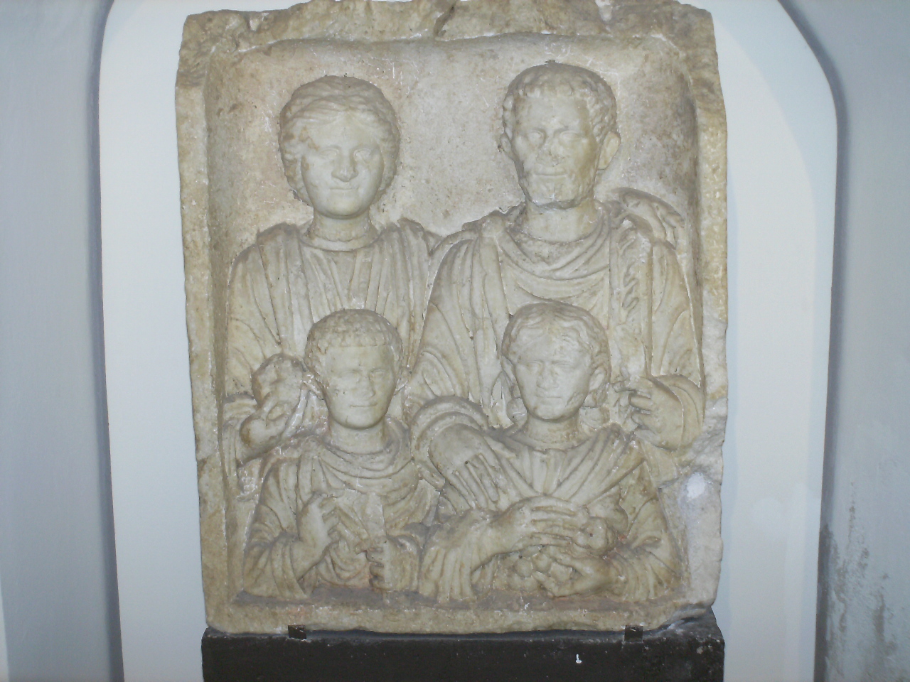 Grabrelief einer Familie (RM Enns)